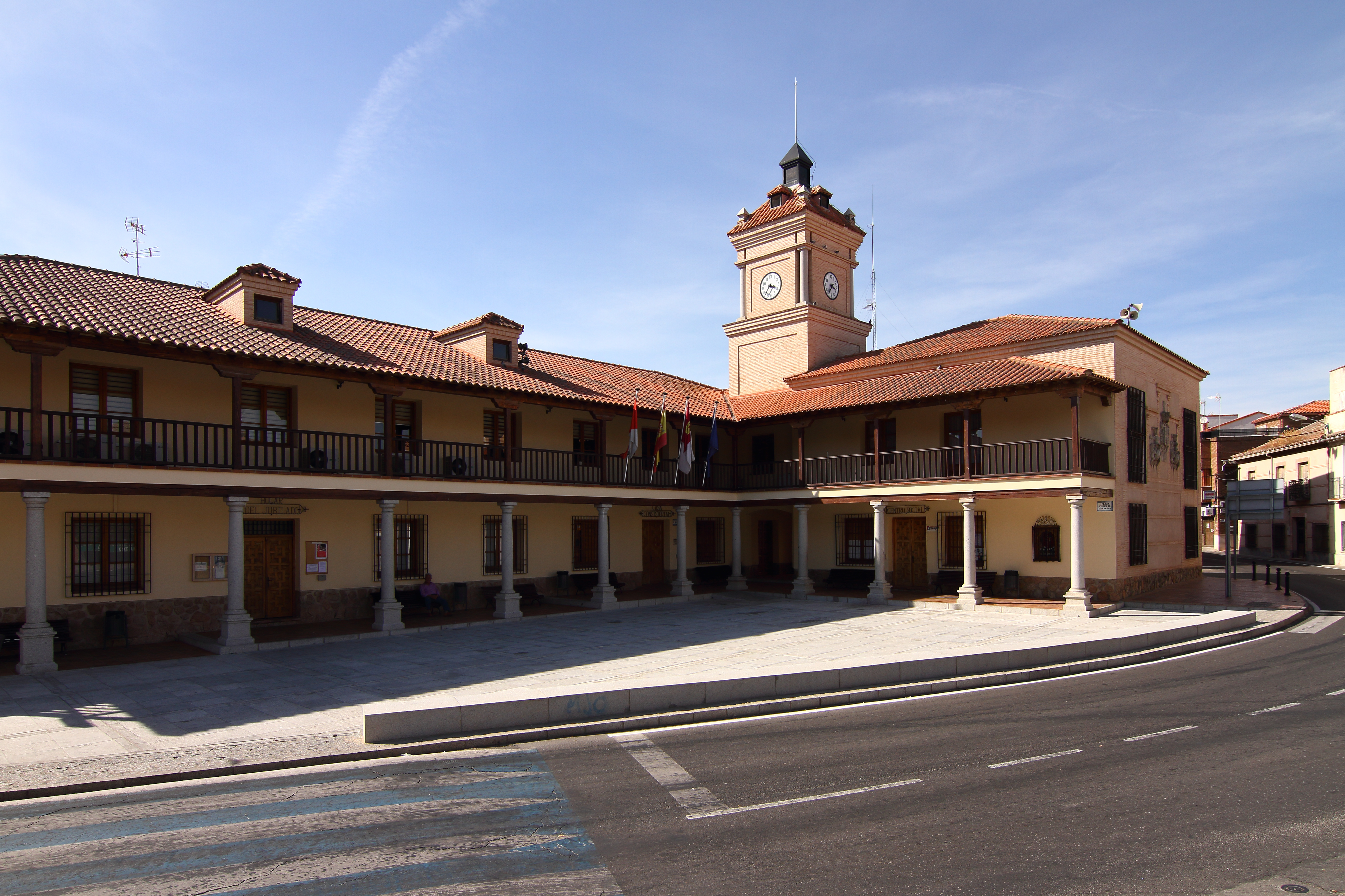 Ayuntamiento de Camarena